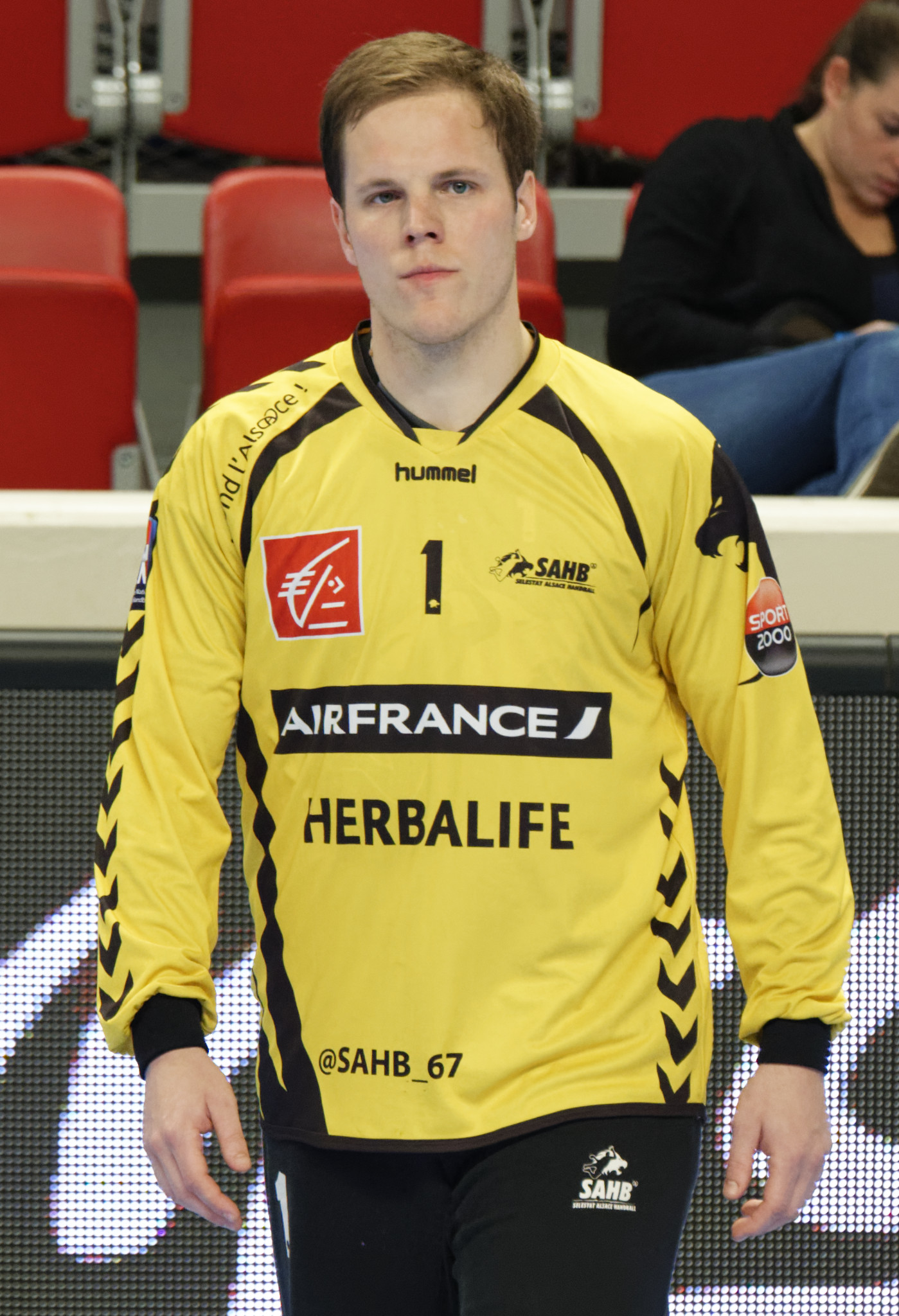 Rencontre de la 20e journée de LNh entre le PSG Handball et Sélestat. A Coubertin, le 08 avril 2015.